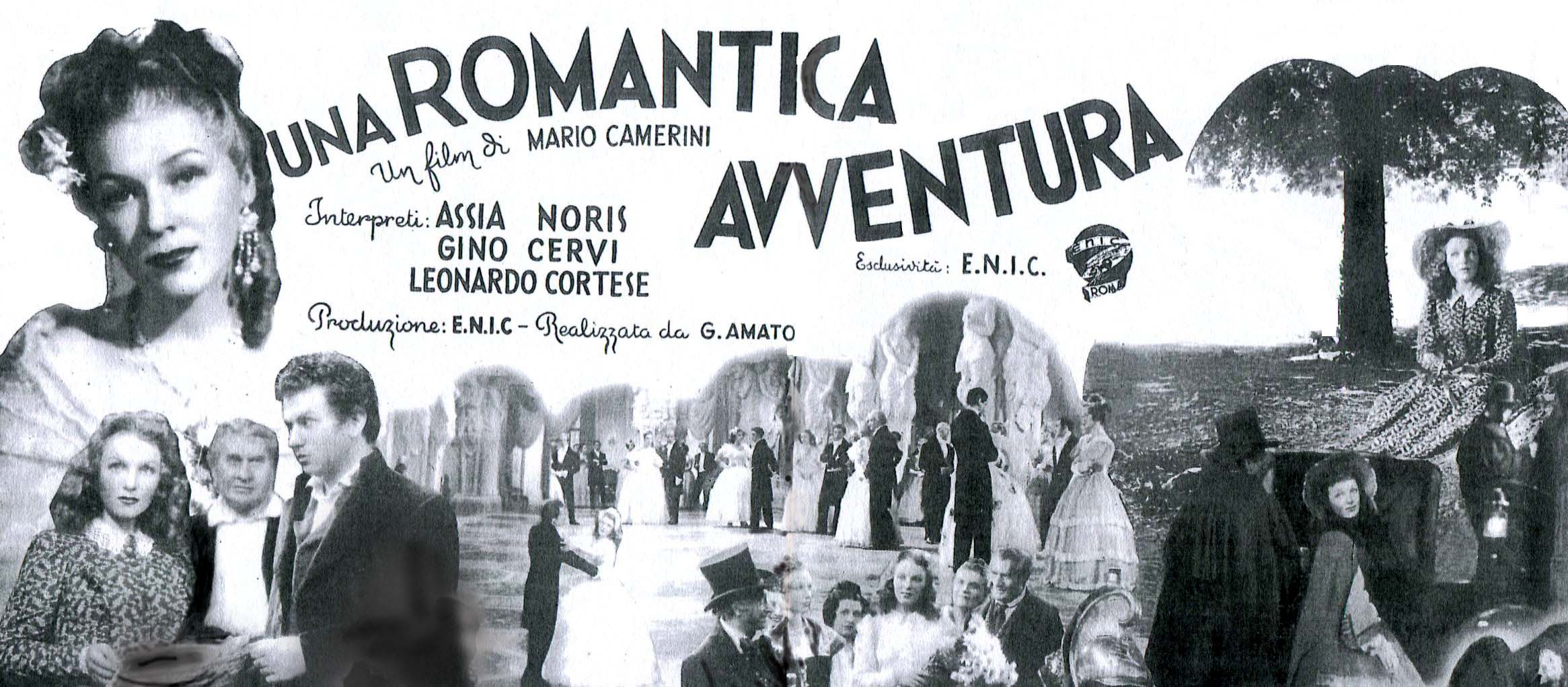 Un'immagine promozionale di "Una romantica avventura" (camerini, 1940)